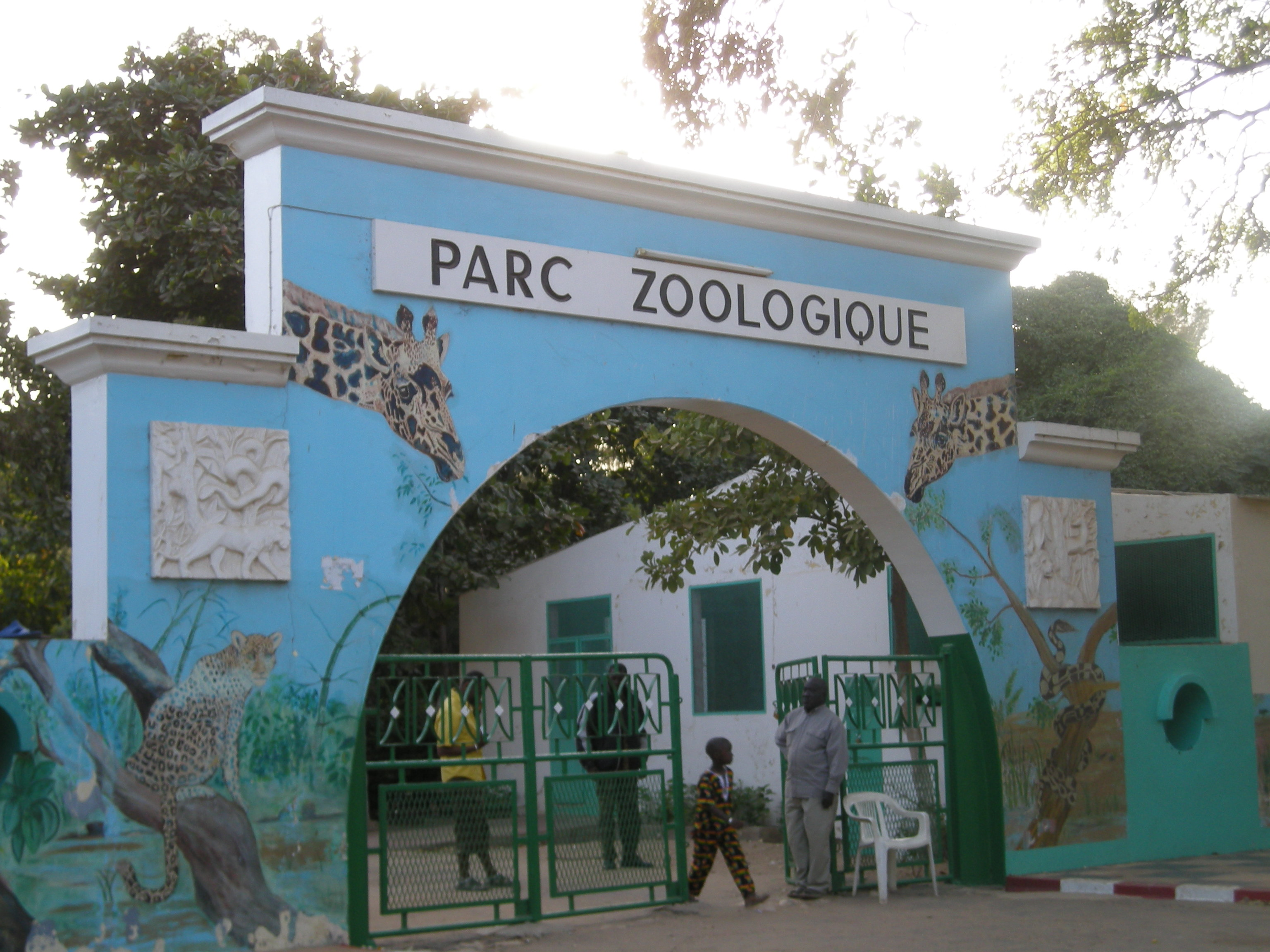 Parc forsetier et zoologique de Hann, à l'est de Dakar, Sénégal